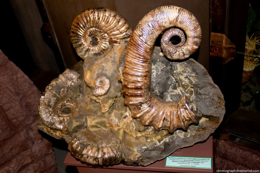 Аммониты, Историко-краеведческий музей им. П. В. Алабина в Самаре